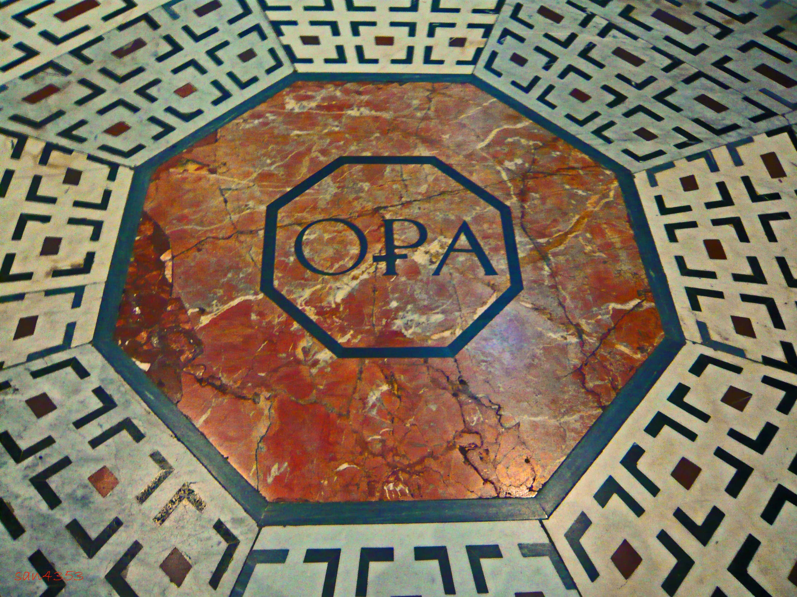 Simbolo dell'Opera del Duomo di Firenze. E' la parola "Operae" scritta con abbreviazioni latine.